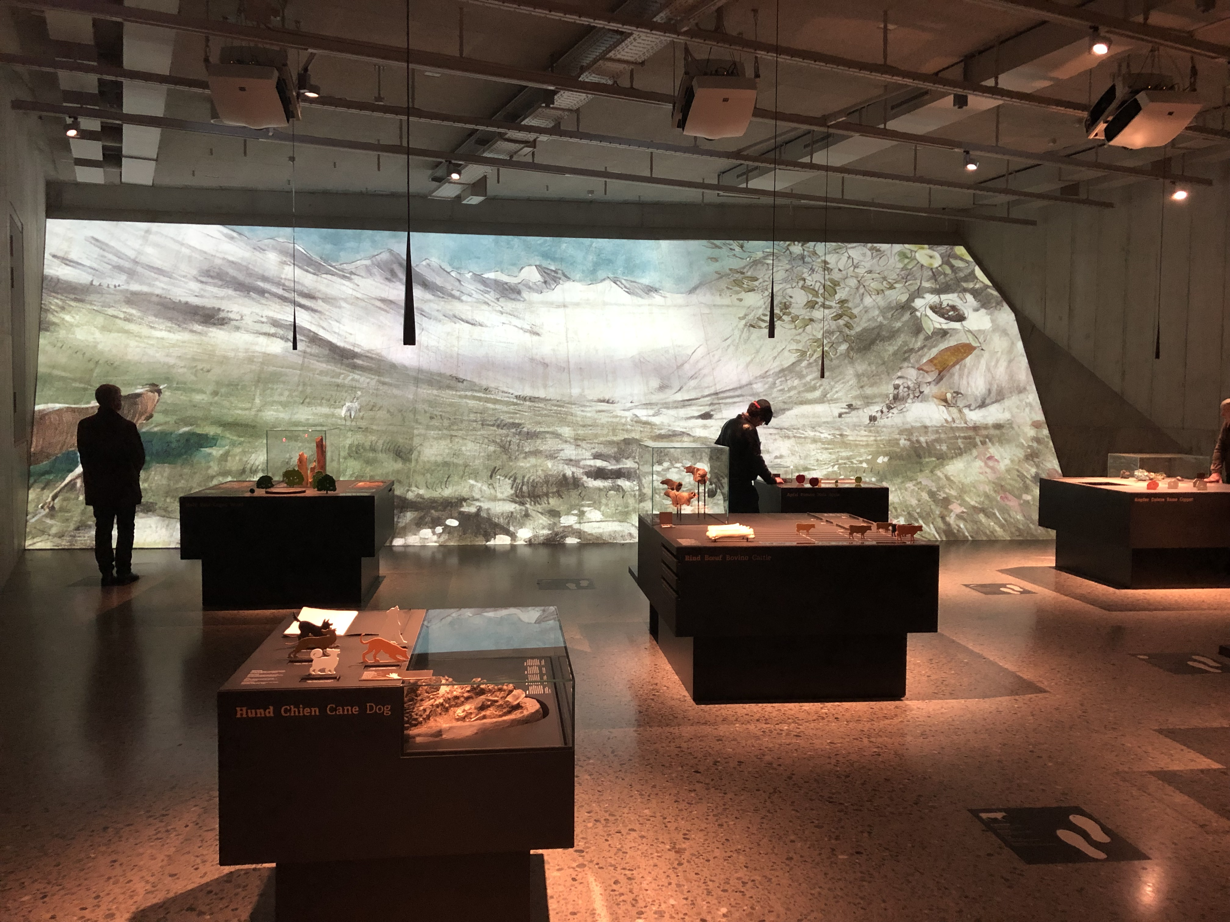 Schweizerisches Landesmuseum in Zürich, Ausstellung Archäologie, interaktives Eiszeitpanorama